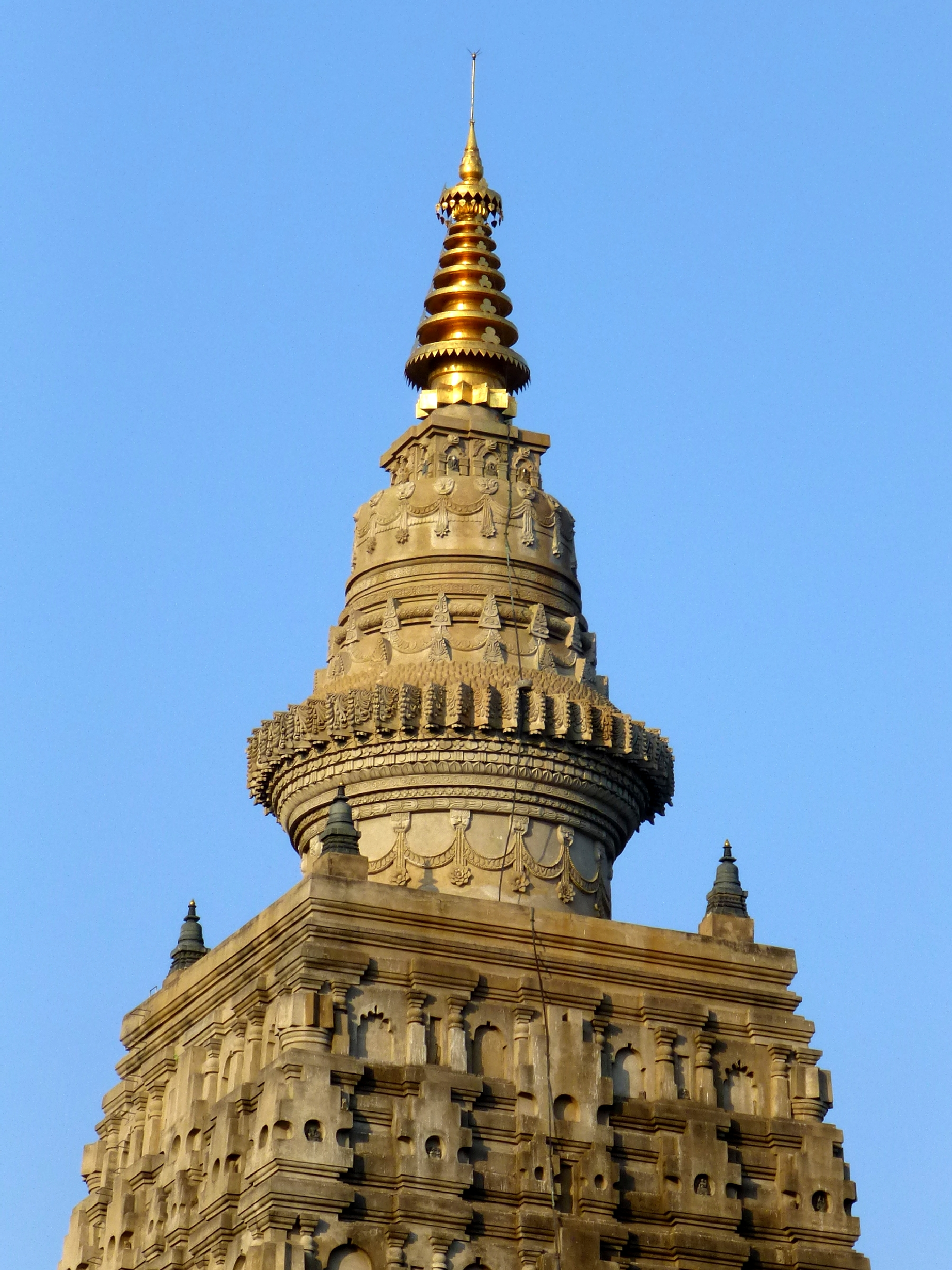 Maha Bodhi Temple Bodh Gaya India